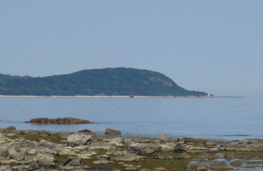 Stenshuvud national park from Tjörnedala